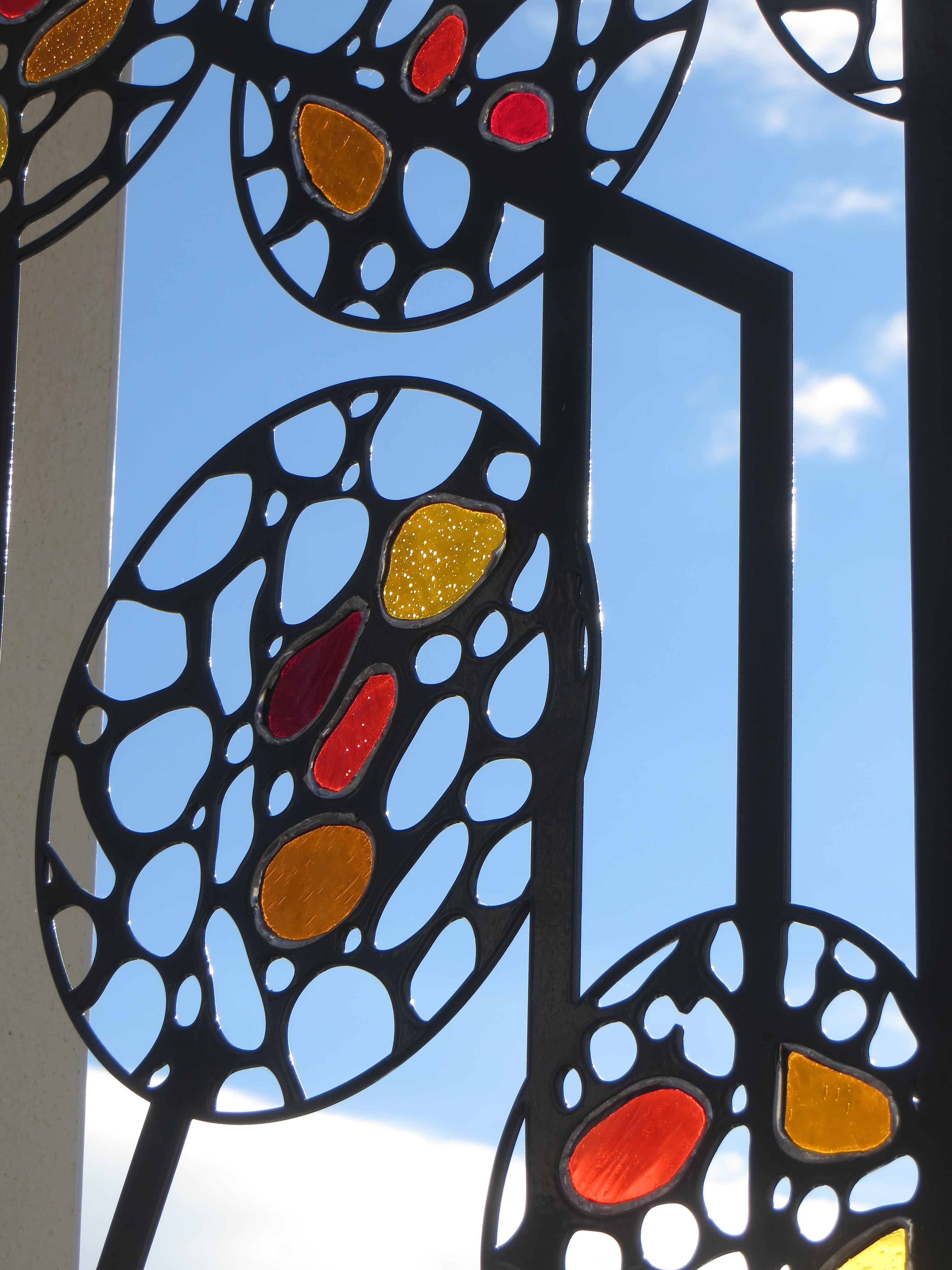 grilles en acier et verre découpés au laser